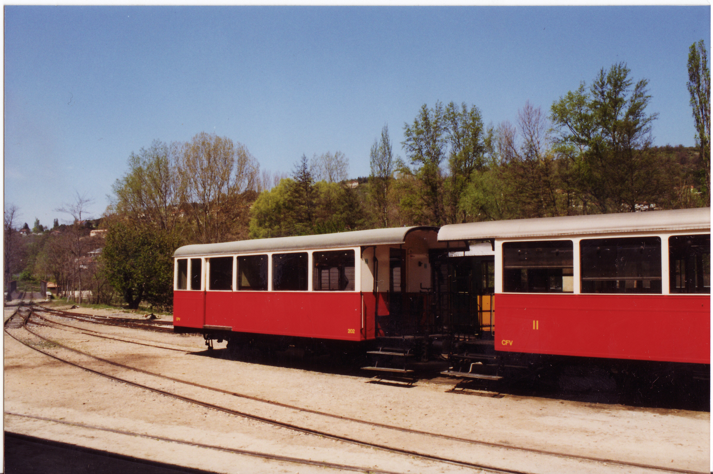 voitures des chemins de fer Véveysans, à Lamastre.